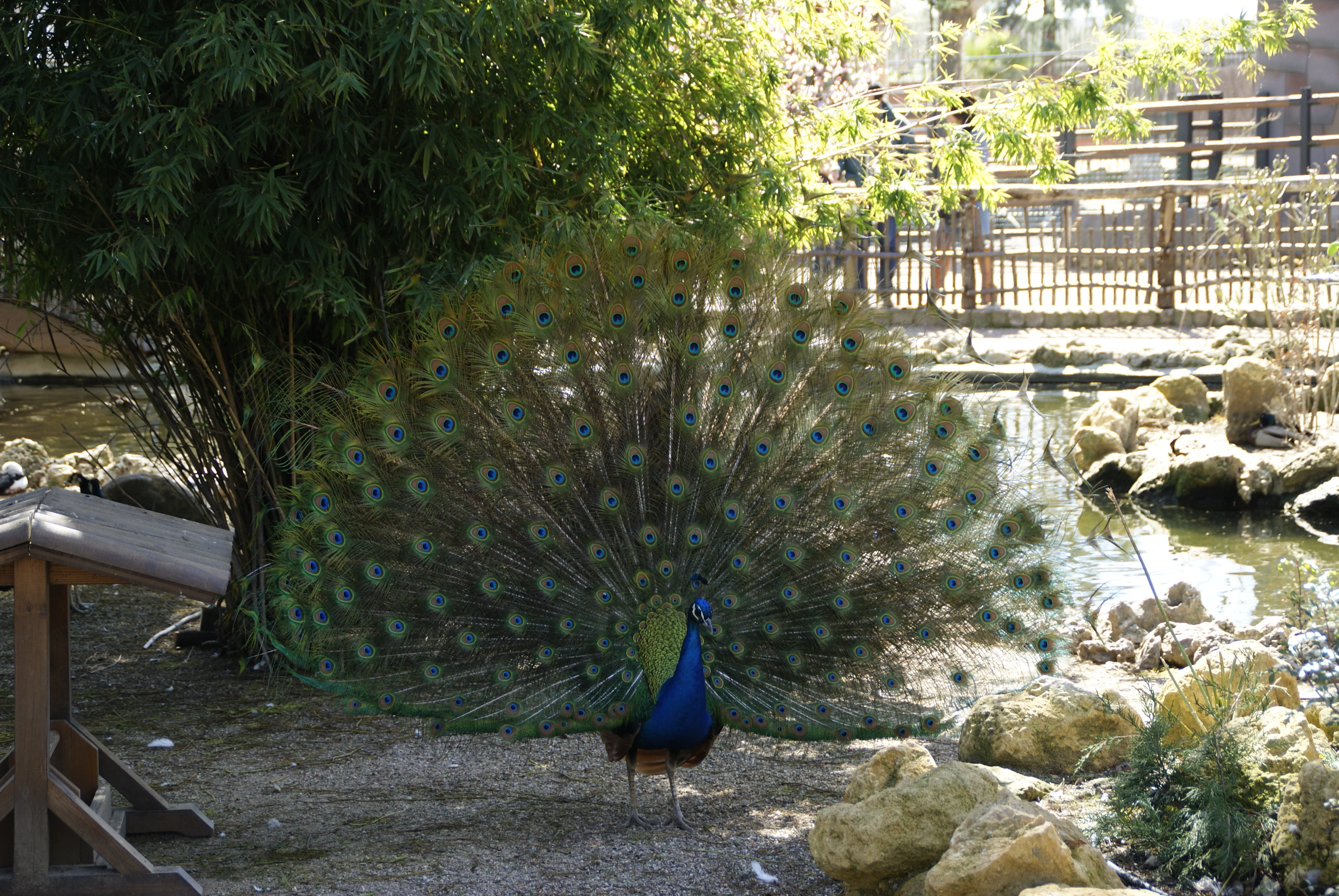 Pavo Real en el Zoológico de Córdoba (España)